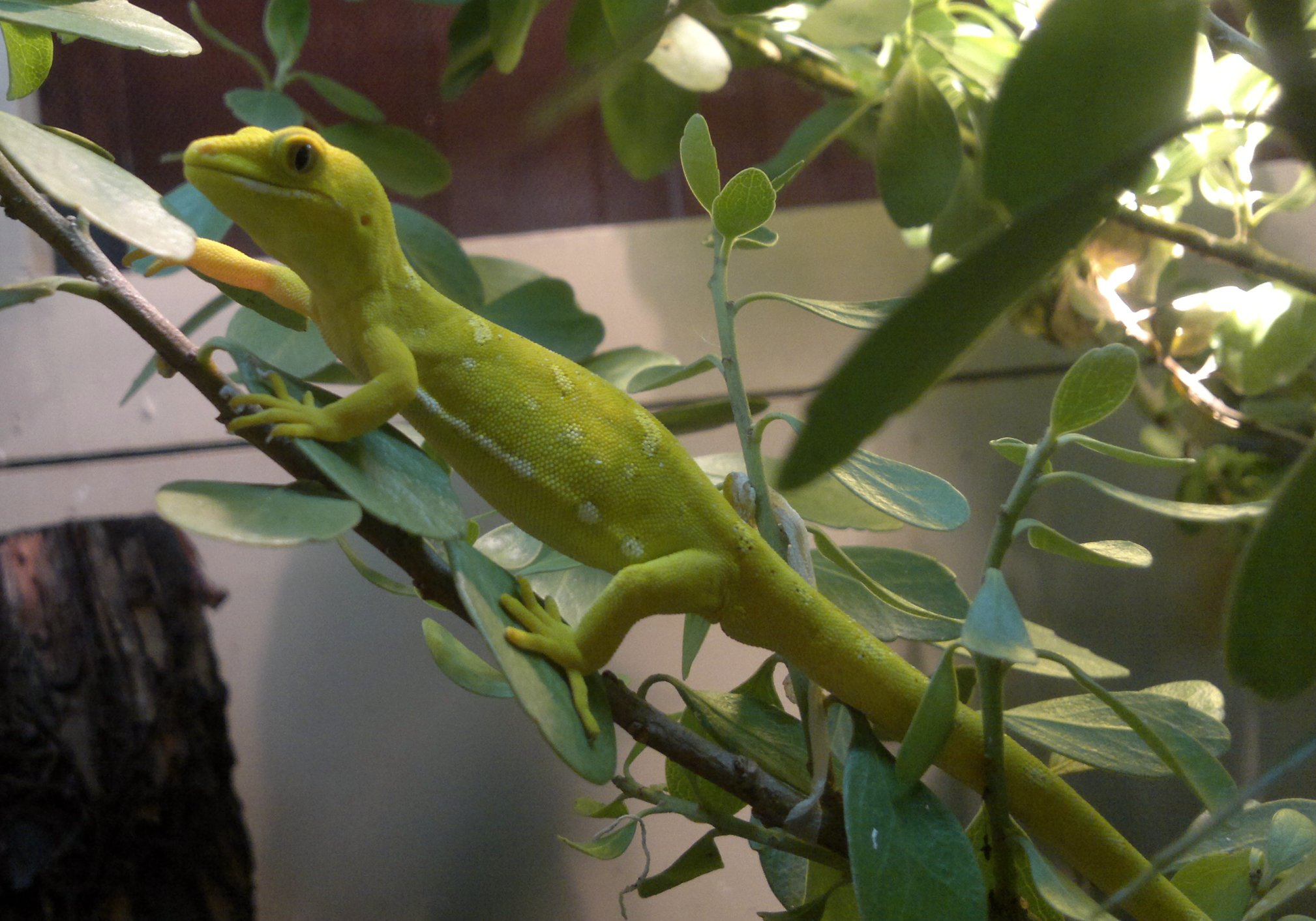 Auckland Green Gecko, in the Kiwi Birdlife Park